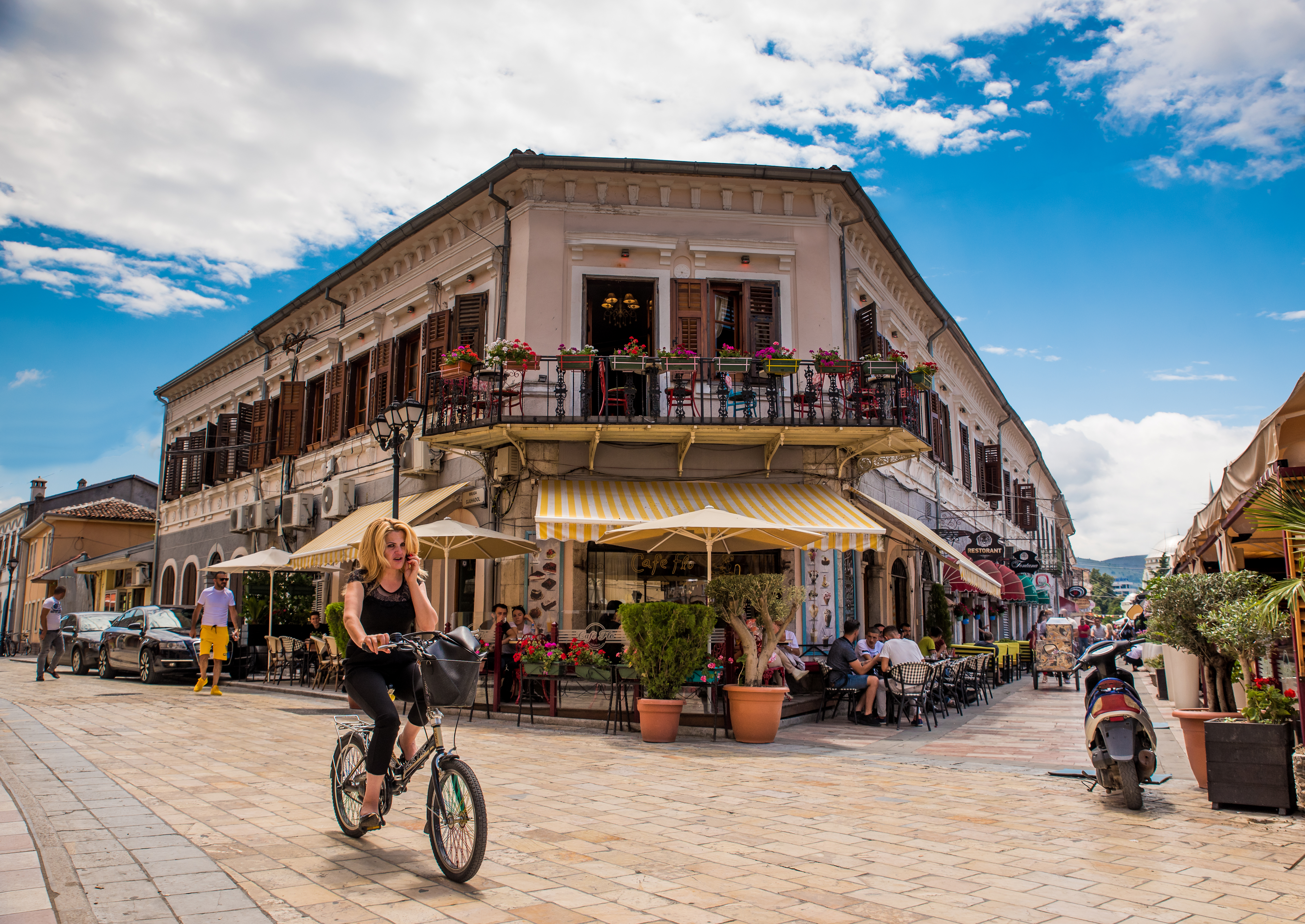 Banesa qytetare shkodrane - Shkoder